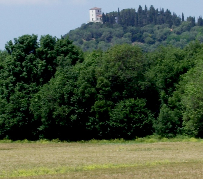 Panorama con Torre Civette (Scarlino)